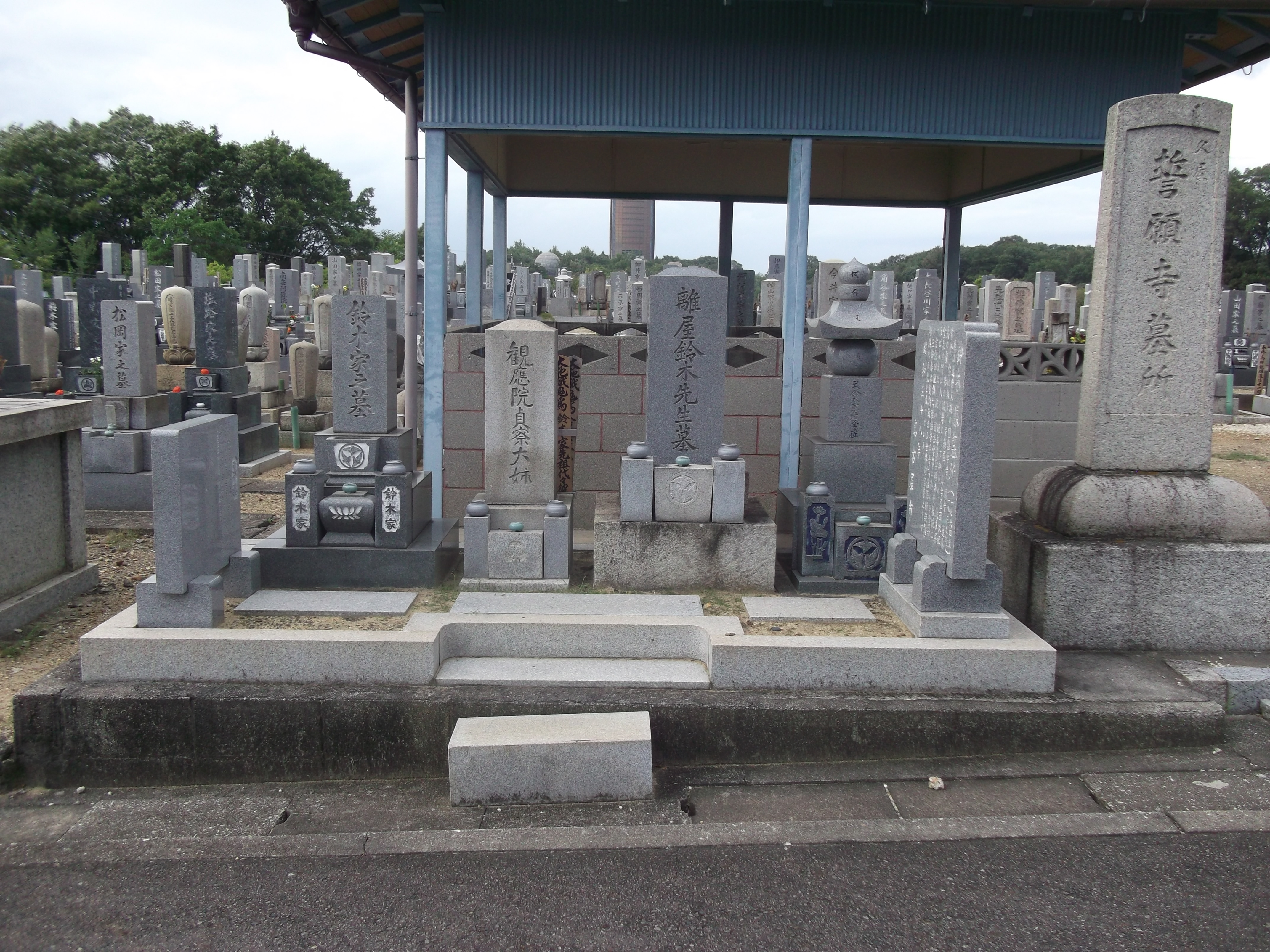 名古屋市千種区の平和公園誓願寺墓地にある国学者鈴木朖の墓